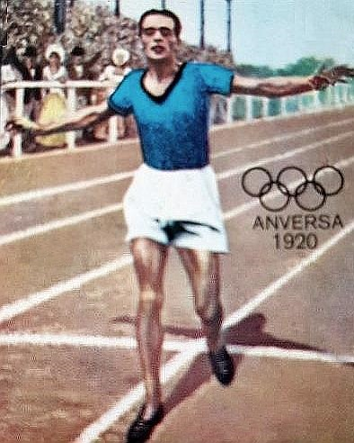 Ugo Frigerio en 1920 - Campioni dello Sport 1968-1969, n°420